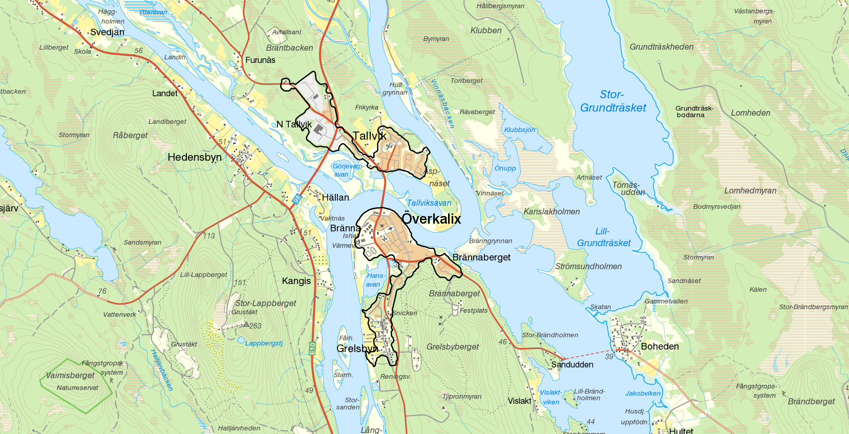 Tätorterna Tallvik och Överkalix med gränserna från Statistiska centralbyråns tätortsavgränsning 2015. Bakgrundskarta från Lantmäteriet, skala 1:30 236.